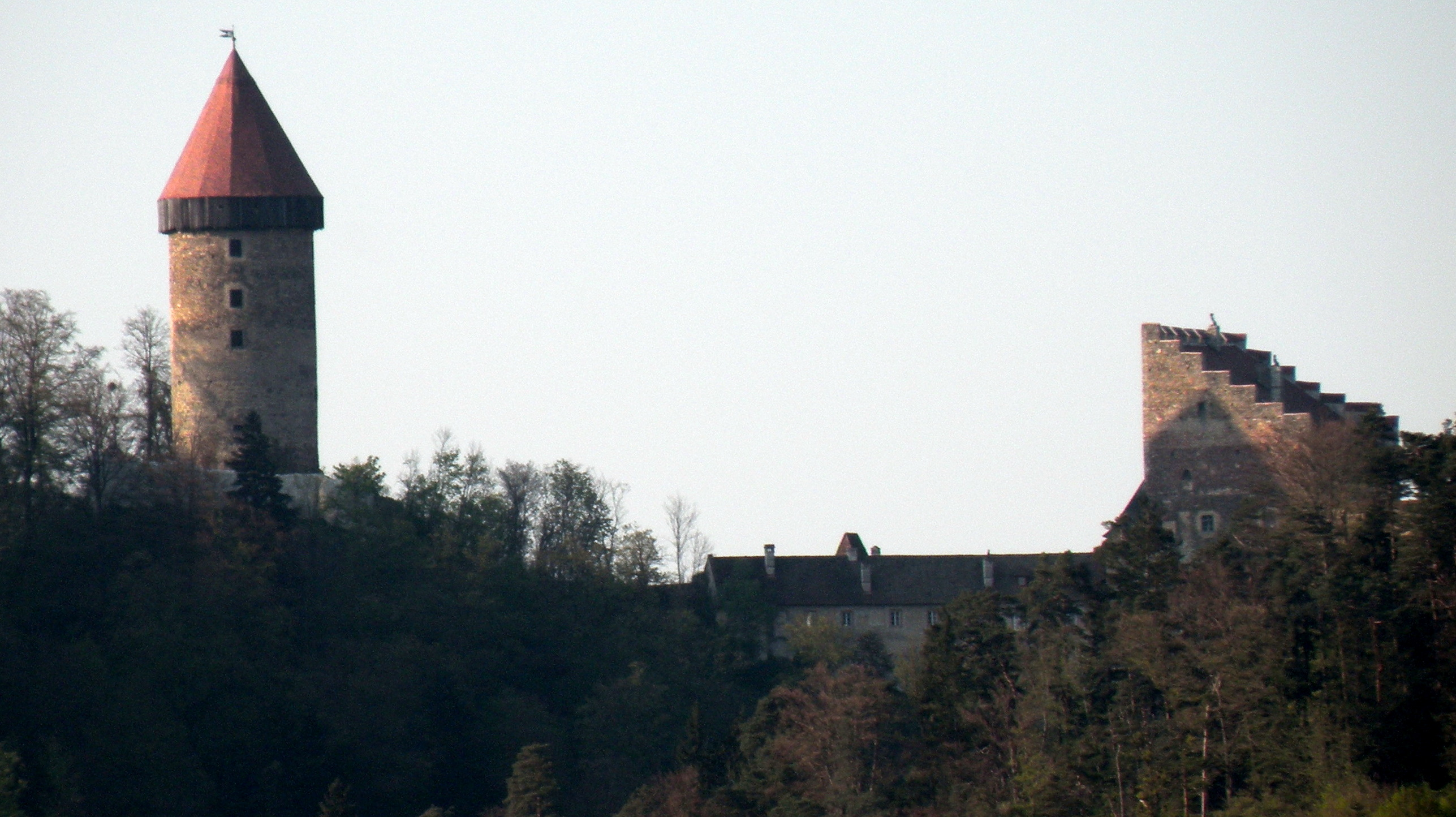 Burg Clam in Klam im Bezirk Perg in Oberösterreich